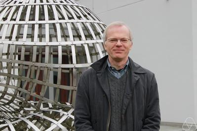 Foto di Kristian Seip